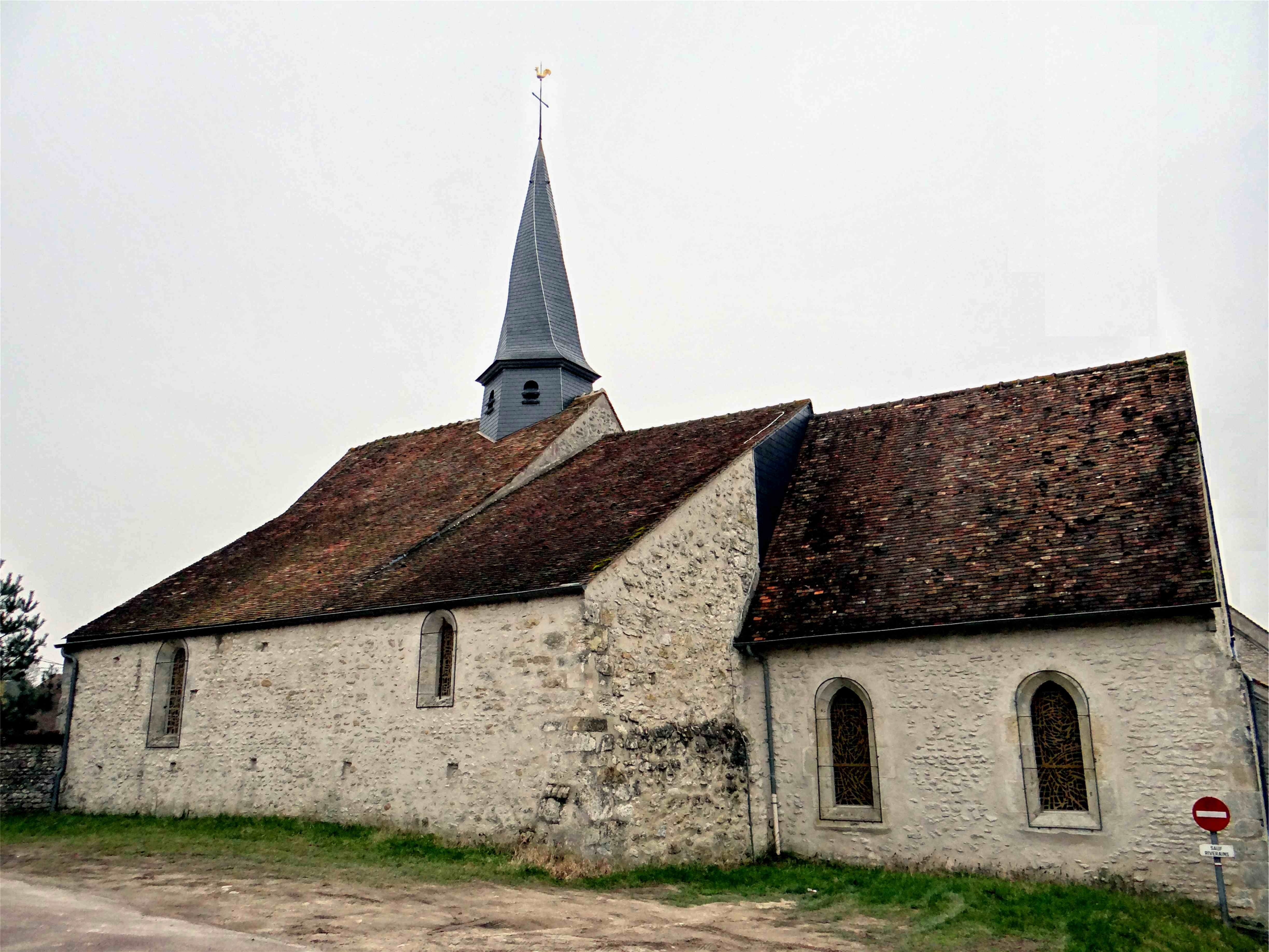 Église Saint Denis, Boulancourt, Seine-et-Marne, France.